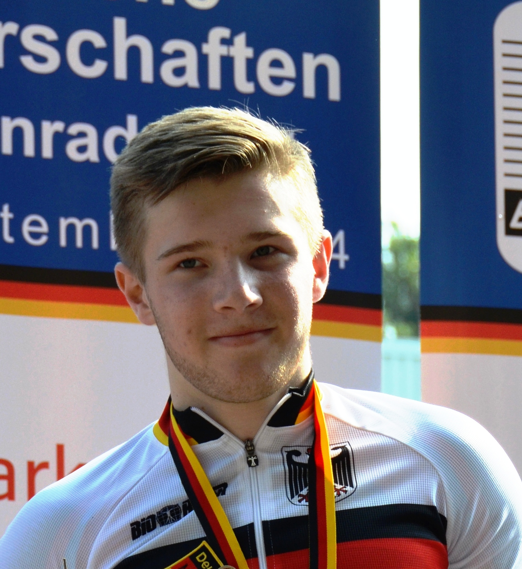 Moritz Meißner, deutscher Radsportler